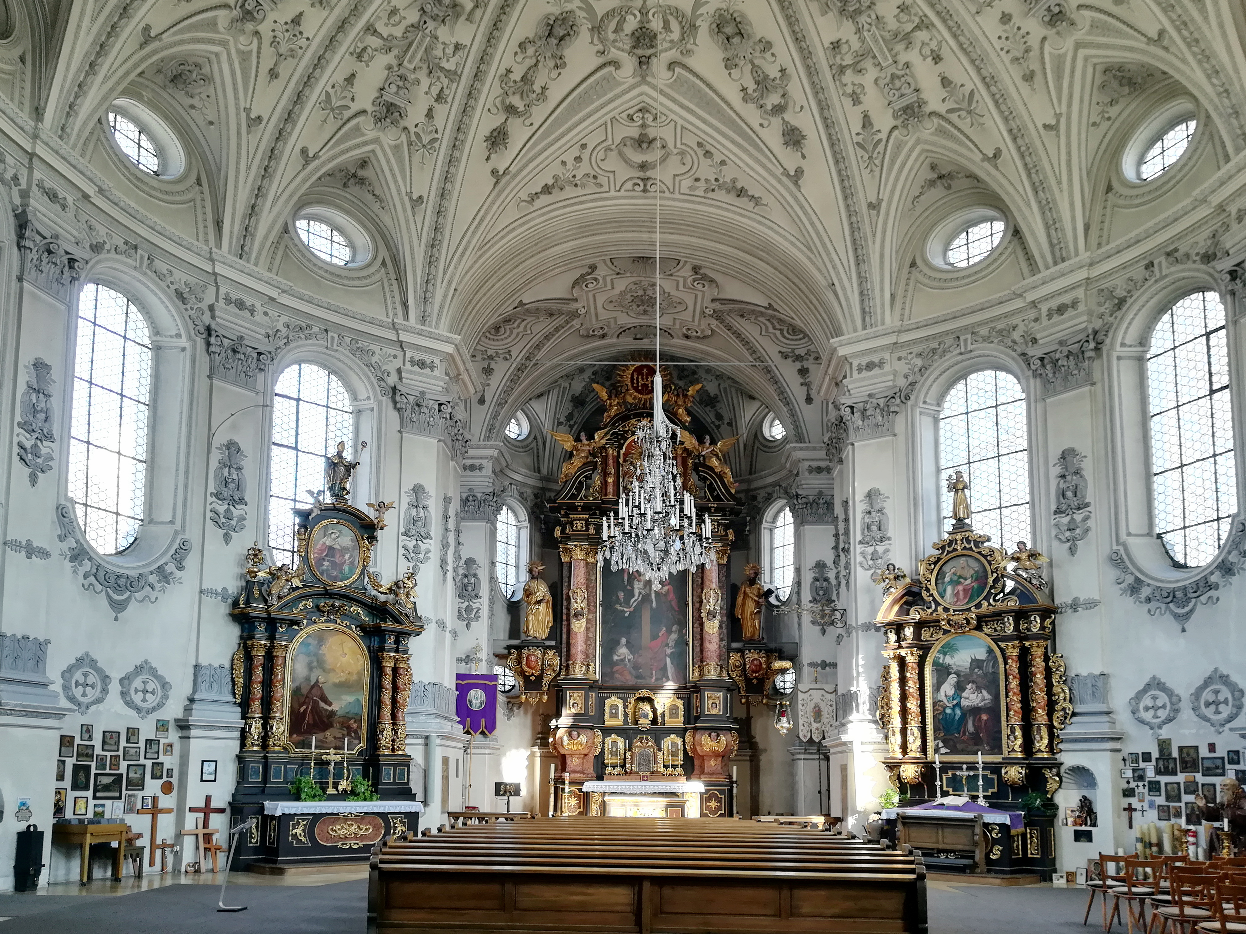 Die katholische Wallfahrtskirche Maria Birnbaum in Sielenbach wurde in der zweiten Hälfte des 17. Jahrhunderts als einer der ersten Zentralbauten des Barock in Bayern errichtet.